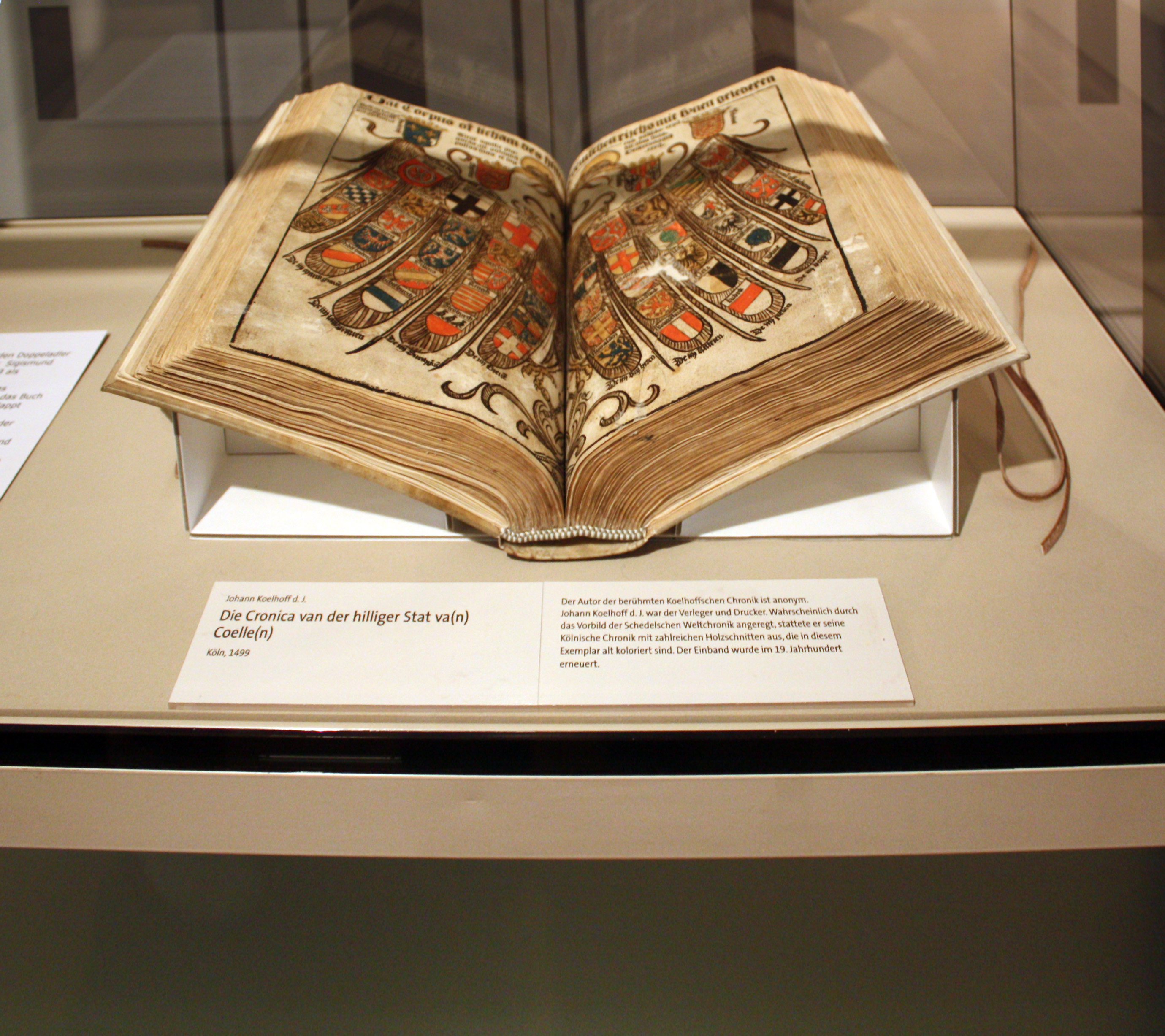 Köln, Johann Koelhoff, zur Unterscheidung von seinem gleichnamigen Vater der Jüngere genannt. Koelhoff Drucker und Verleger veröffentlichte die mit einer großen Anzahl von Holzschnitten angereicherte Kölnische Chronik („Cronica van der hilliger Stat van Coellen“), die am 23. August 1499 erschien und auch als „Koelhoffsche Chronik“ bezeichnet wird. Der Einband des Buches wurde im 19. Jahrhundert erneuert. Ort der Ausstellung: Rheinisches Landesmuseum Bonn